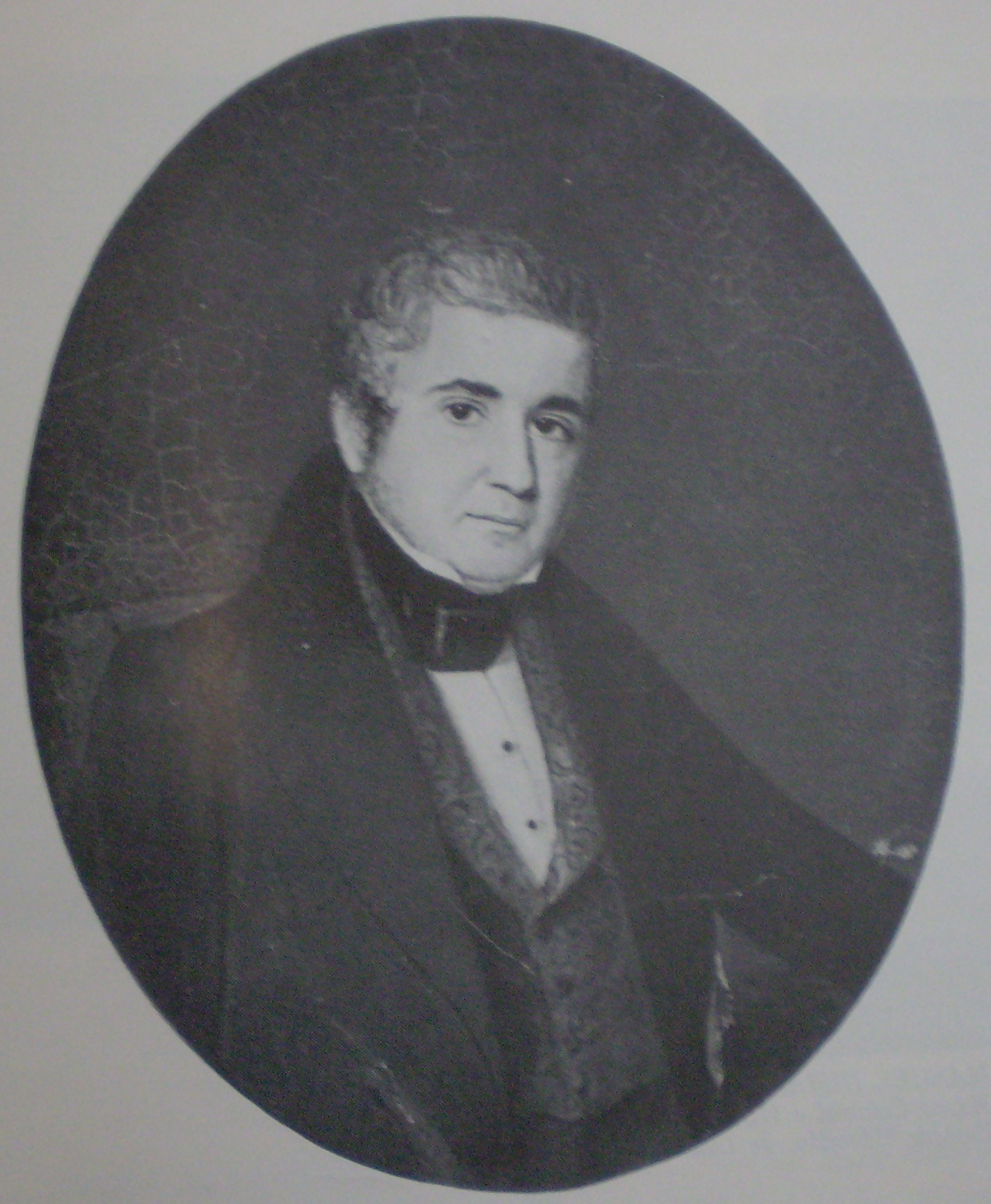 José María Roxas y Patrón, óleo de Carlos E. Pellegrini. Original en el Museo Histórico Nacional